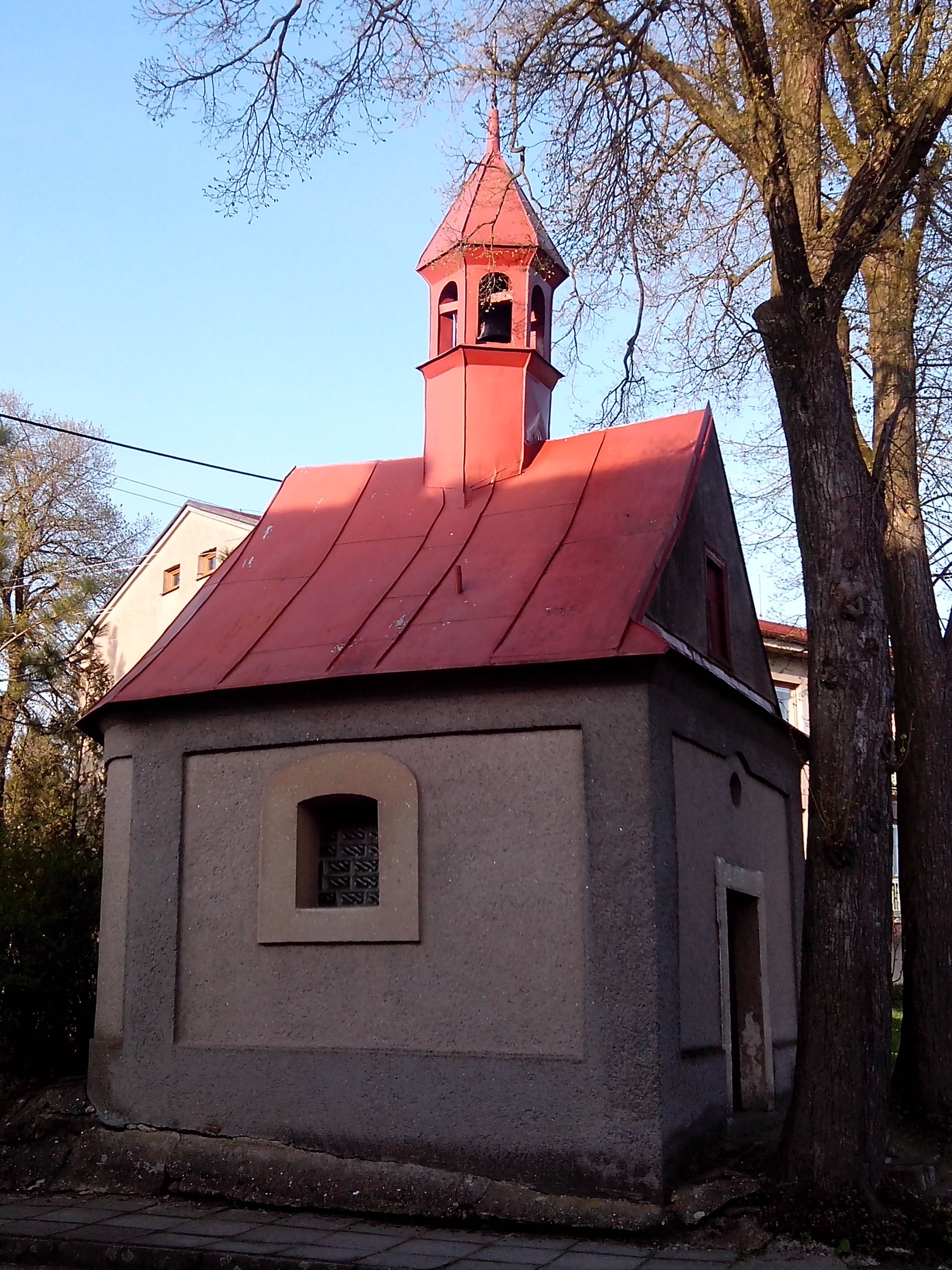 Kaplička v Hřibojedech